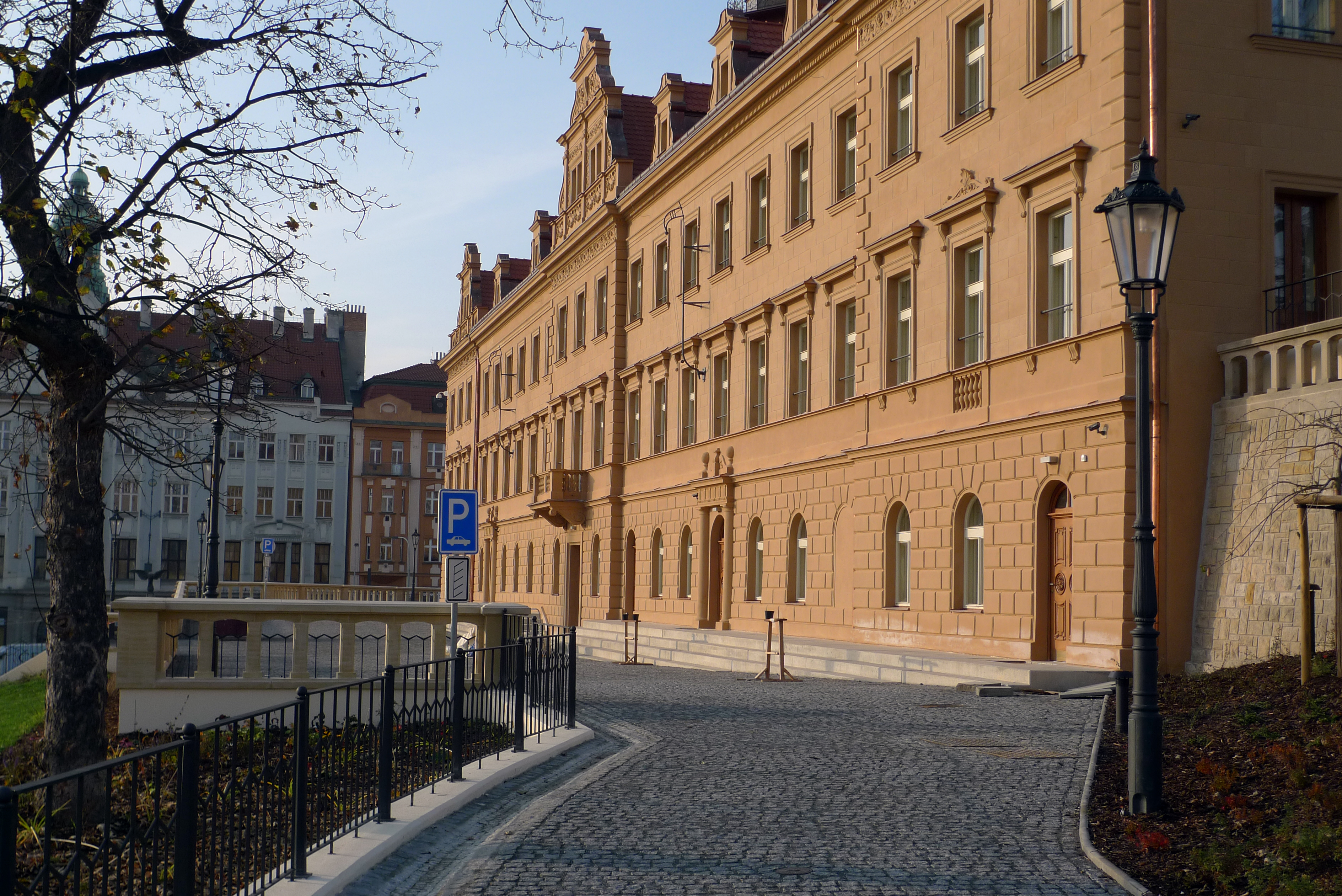 Vršovický zámeček v Praze 10 - Rangherka - těsně po rekonstrukci v listopadu 2013.